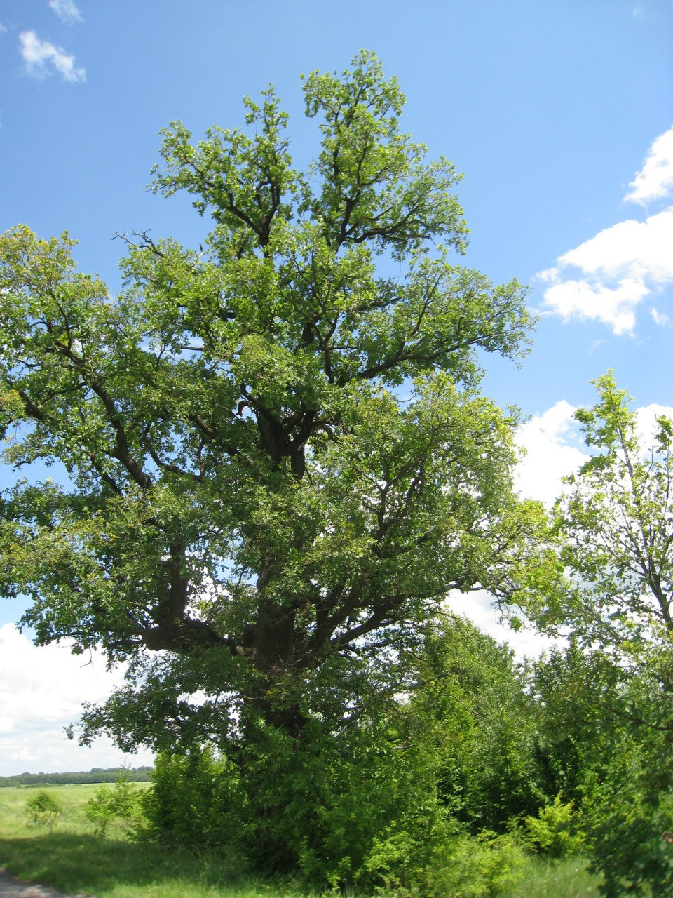 Дуб Устима Кармелюка